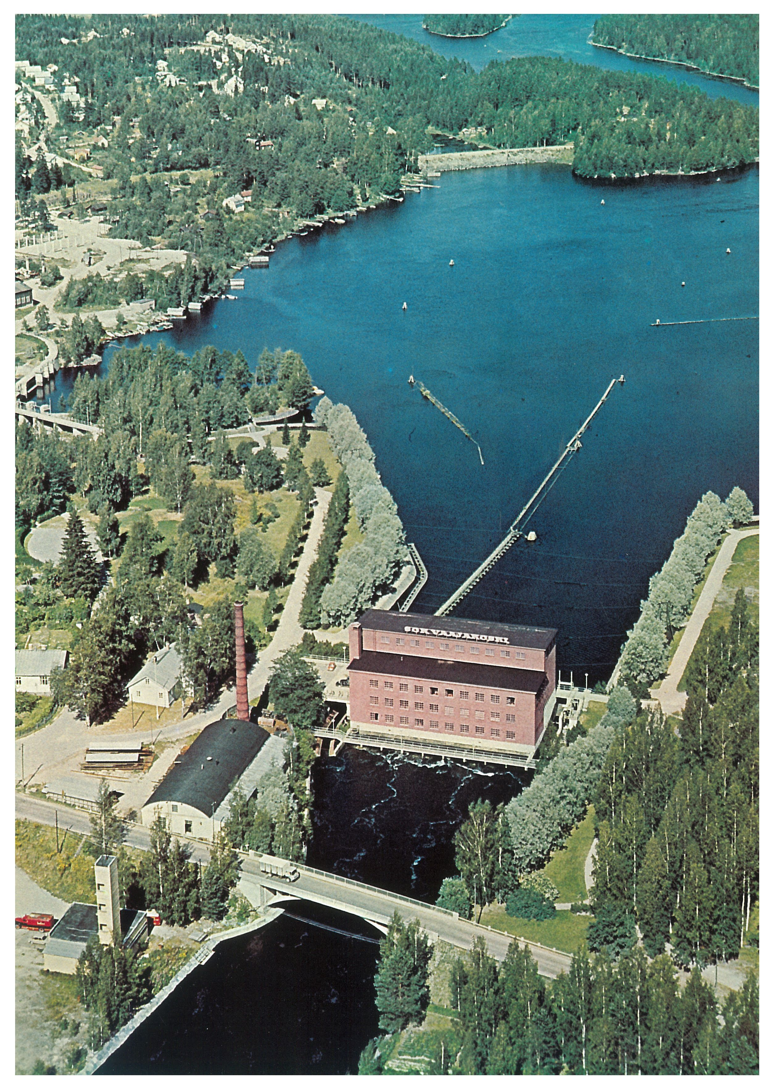 Vaajakosken voimalaitos ja Jyväskylä-Kuopio-tie